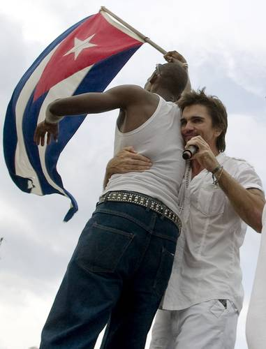 Juanes con la bandera de Cuba